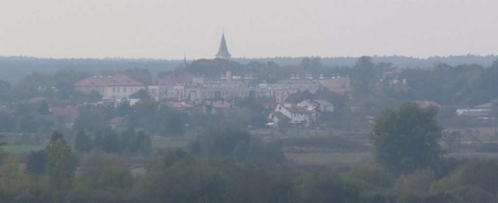 Panorama Niska